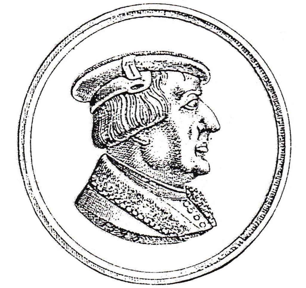 Podoba Jana z Pernštejna (+1548) je známa pouze z reliéfu jeho pamětní medaile uložené ve Východočeském muzeu v Pardubicích. Obrázek odvozen z grafiky zveřejněné v práci: Petr Vorel, Páni z Pernštejna (českomoravský rod v zrcadle staletí), Pardubice, 1993. Obrázek zachycuje líc medaile. Na rubu je erb Pernštejnů a v opise: "IOHANNES BARO - A PERNESTAIN". Legenda je přerušena dolní částí štítu se znakem Pernštejnů (hlava zubra s houžví v nozdrách)